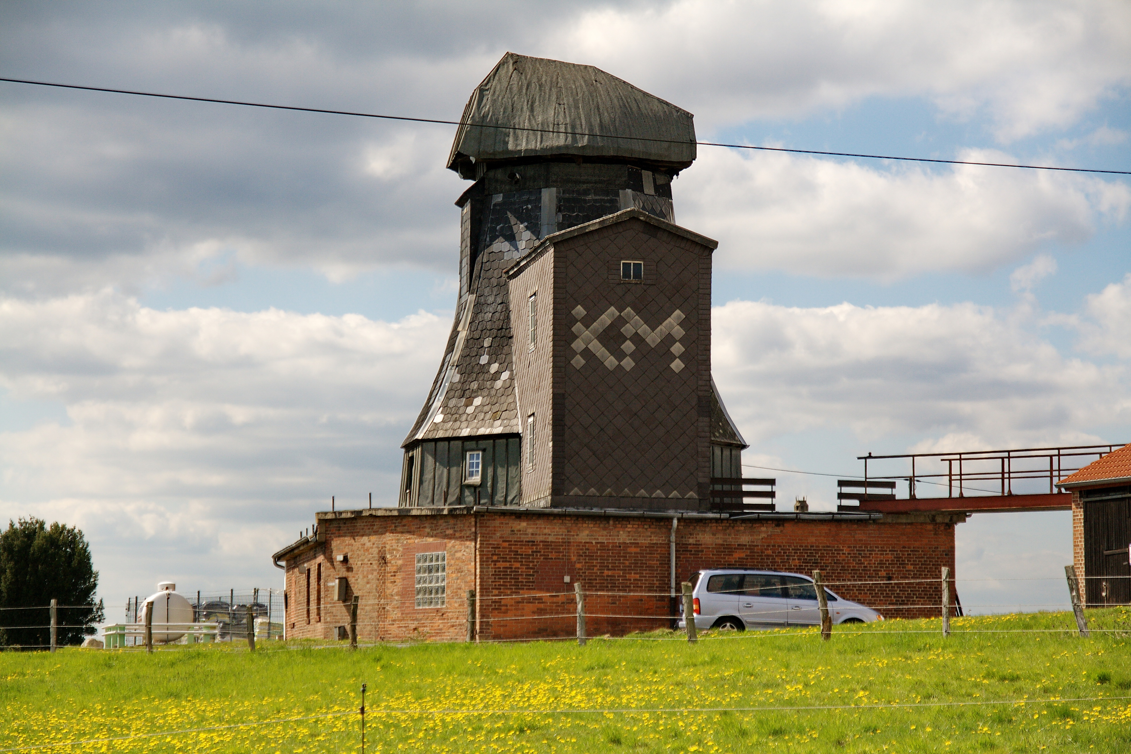 Mühle in Harenberg (Seelze), Niedersachsen, Deutschland